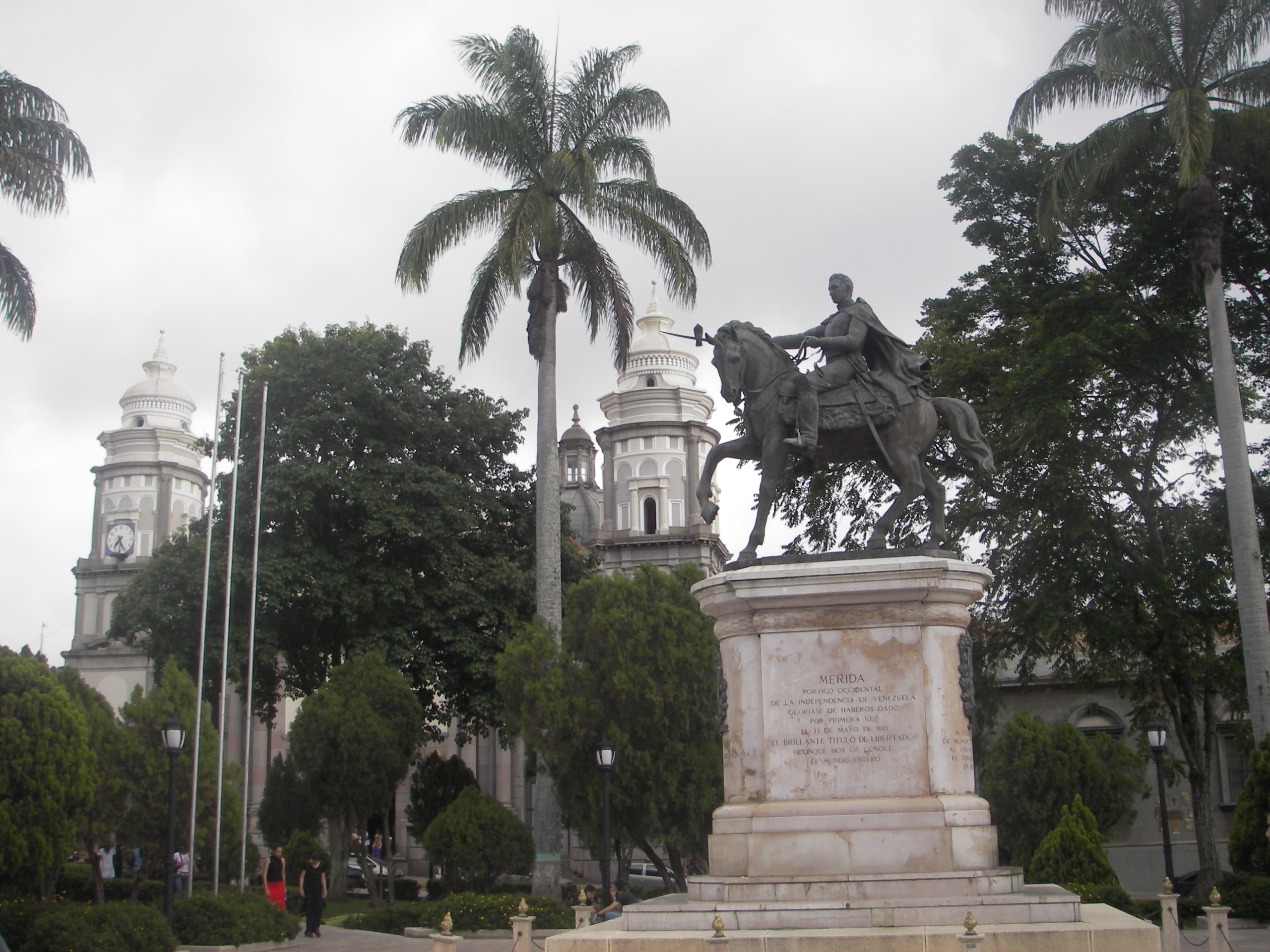 Imagen de la Plaza Bolívar de Mérida, Venezuela; en primer plano la estatua de Simón Bolívar en el centro de la plaza, de fondo, la Catedral de Mérida.Licencia Libre, imagen tomada por Jorge Paparoni, favor nombrar fotógrafo y fuente para enlaces externos.